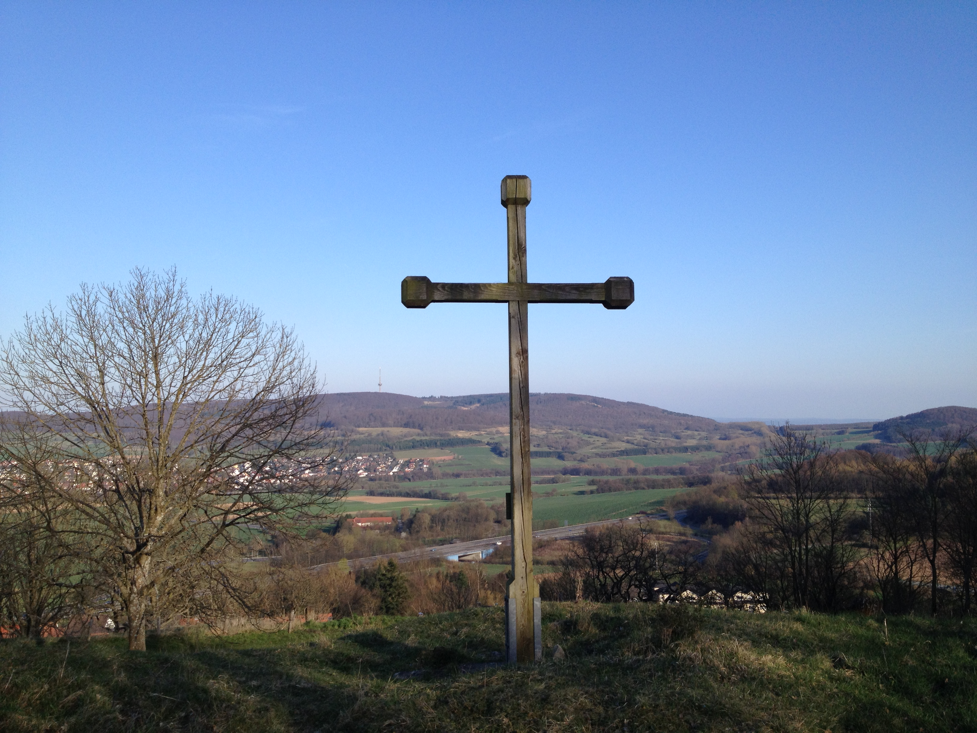 Ein Kreuz auf dem Hasunger Berg